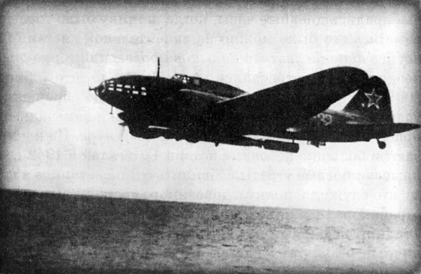 Ил-4 1-го гвардейского МТАП с торпедой 45-36АН